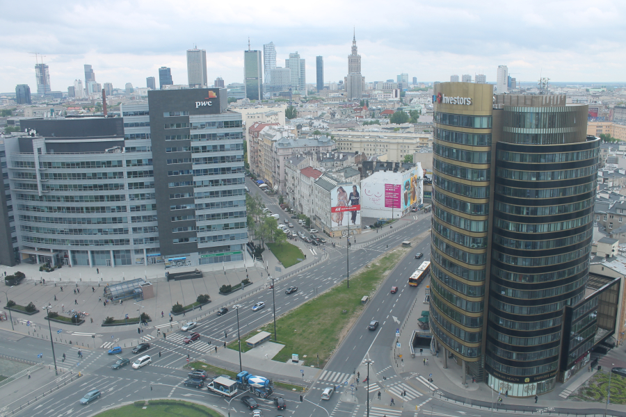 Otoczenie południowej głowicy stacji metra A11 Politechnika widziane z 16. piętra Domu Studenckiego Riviera.